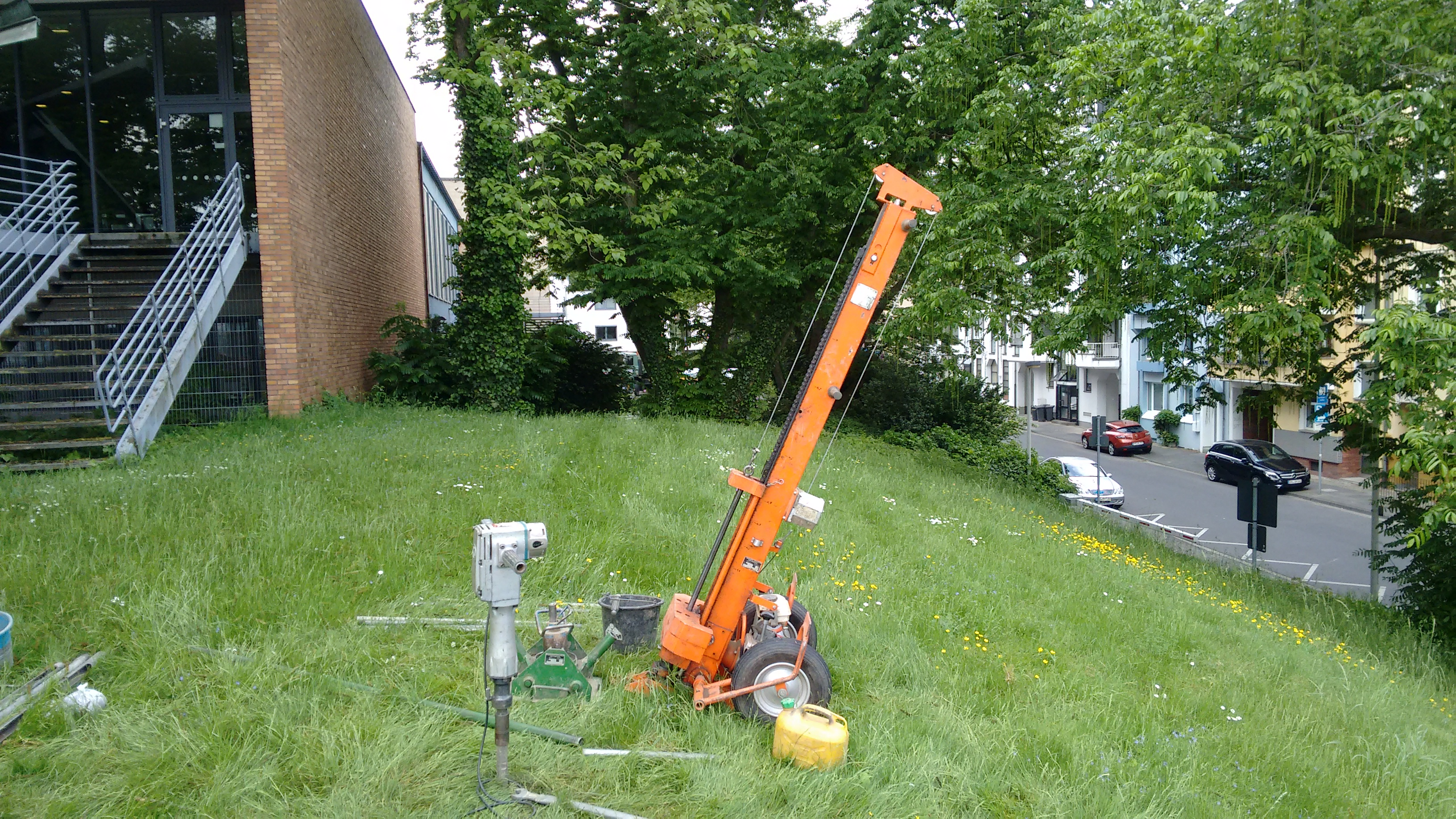 Schwere Ramm- und Rammkernsondierung an der Betthovenhalle in Bonn. Die Schwere Rammsonde (orange) ist noch nicht aufgerichtet. Nach Aufrichten und Hochkurbeln des Fallbärs ist die Rammsonde einsatzbereit.